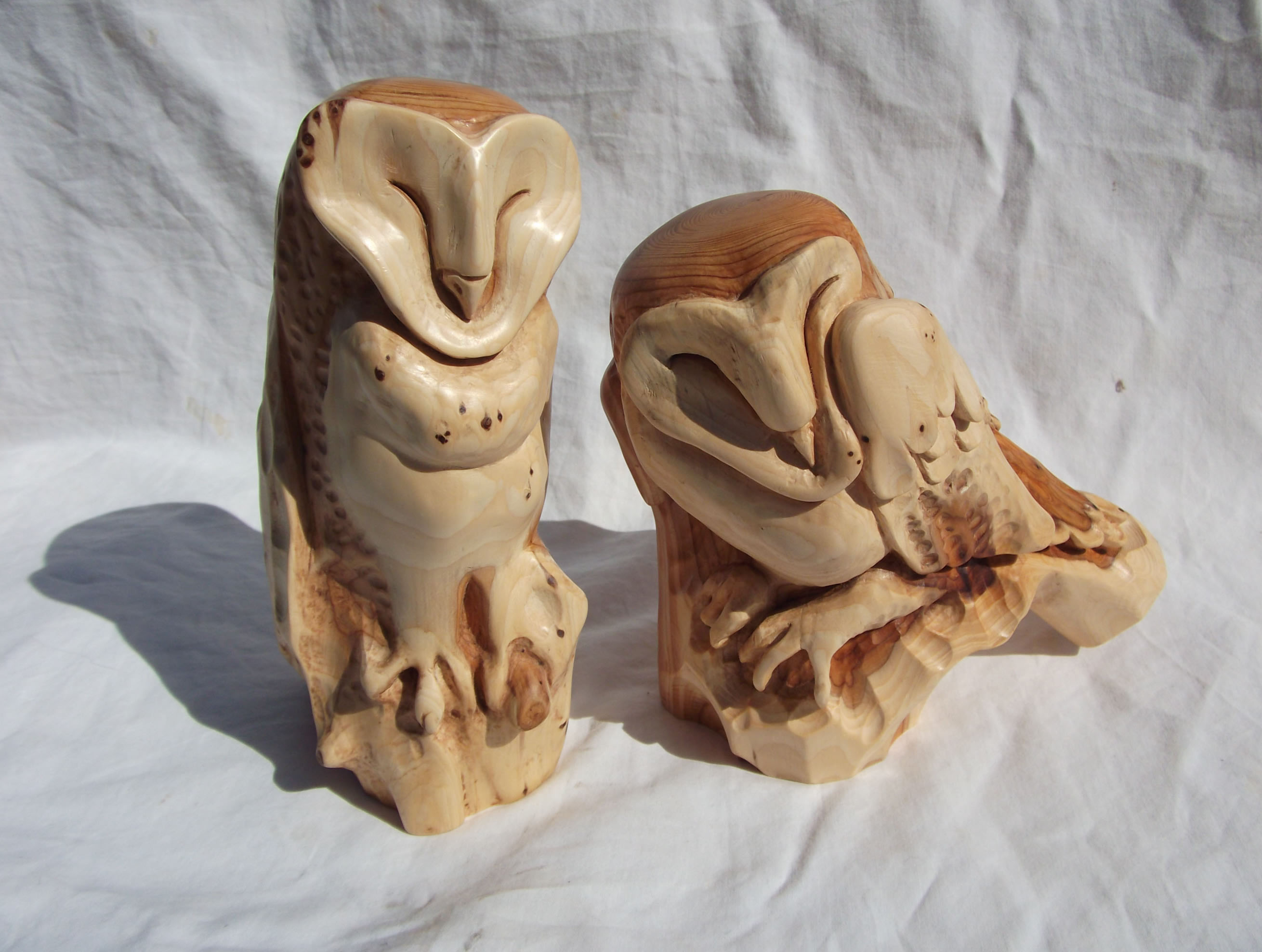 Sculptures en if 2011